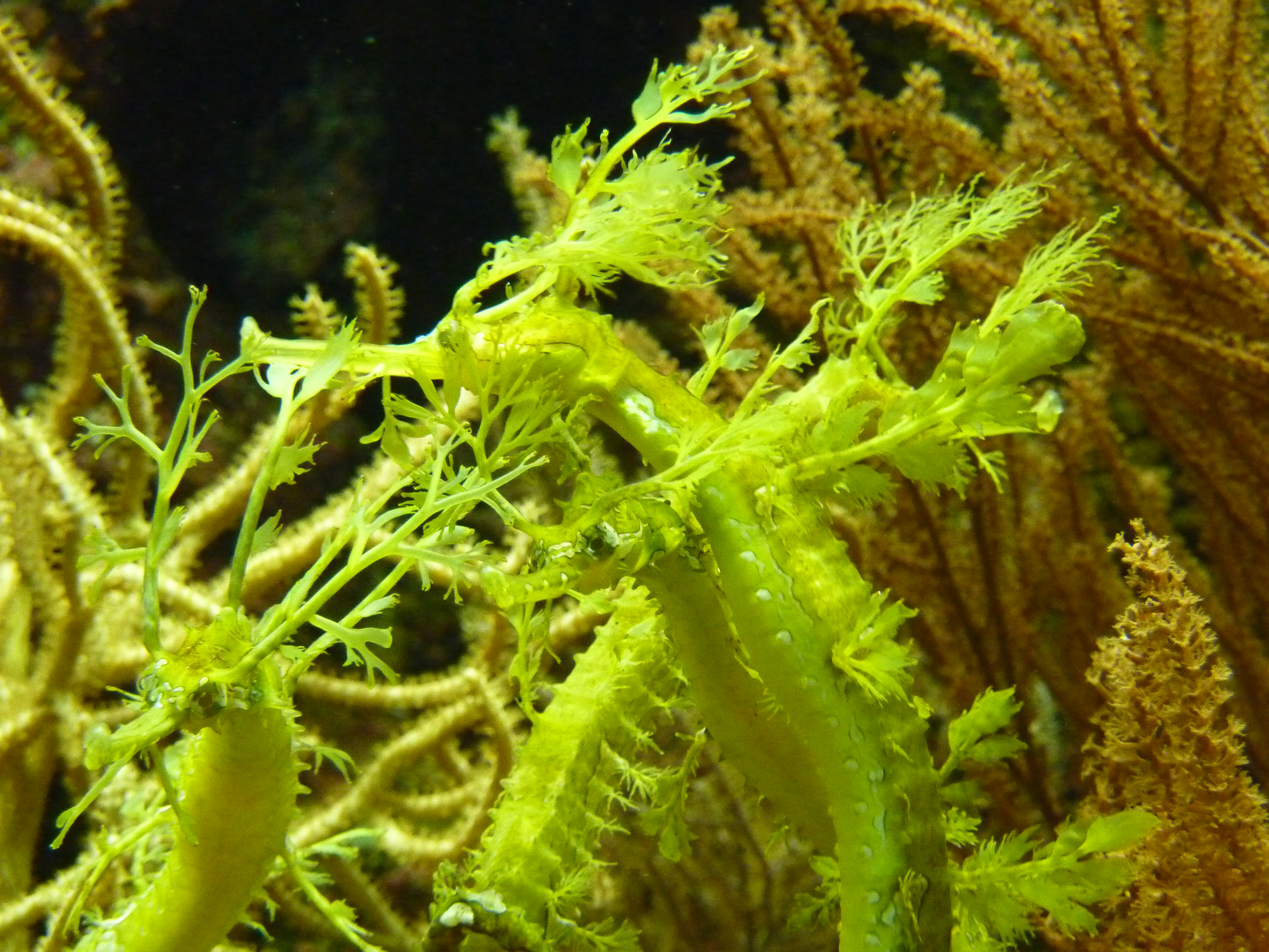 Seepferdchen in der Wilhelma